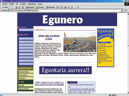 Egunero